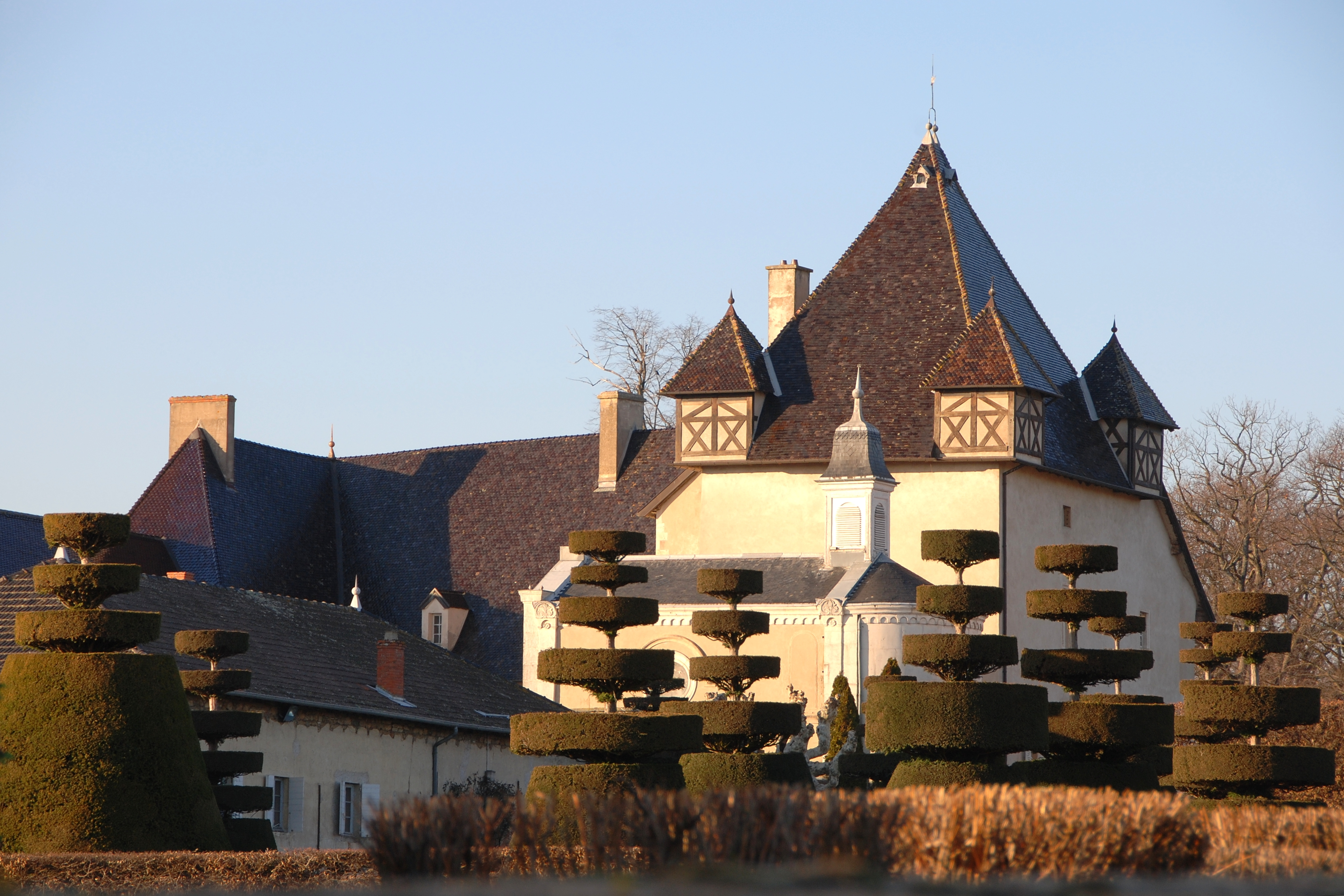 Château de Pizay, (Inscrit, 1972) .